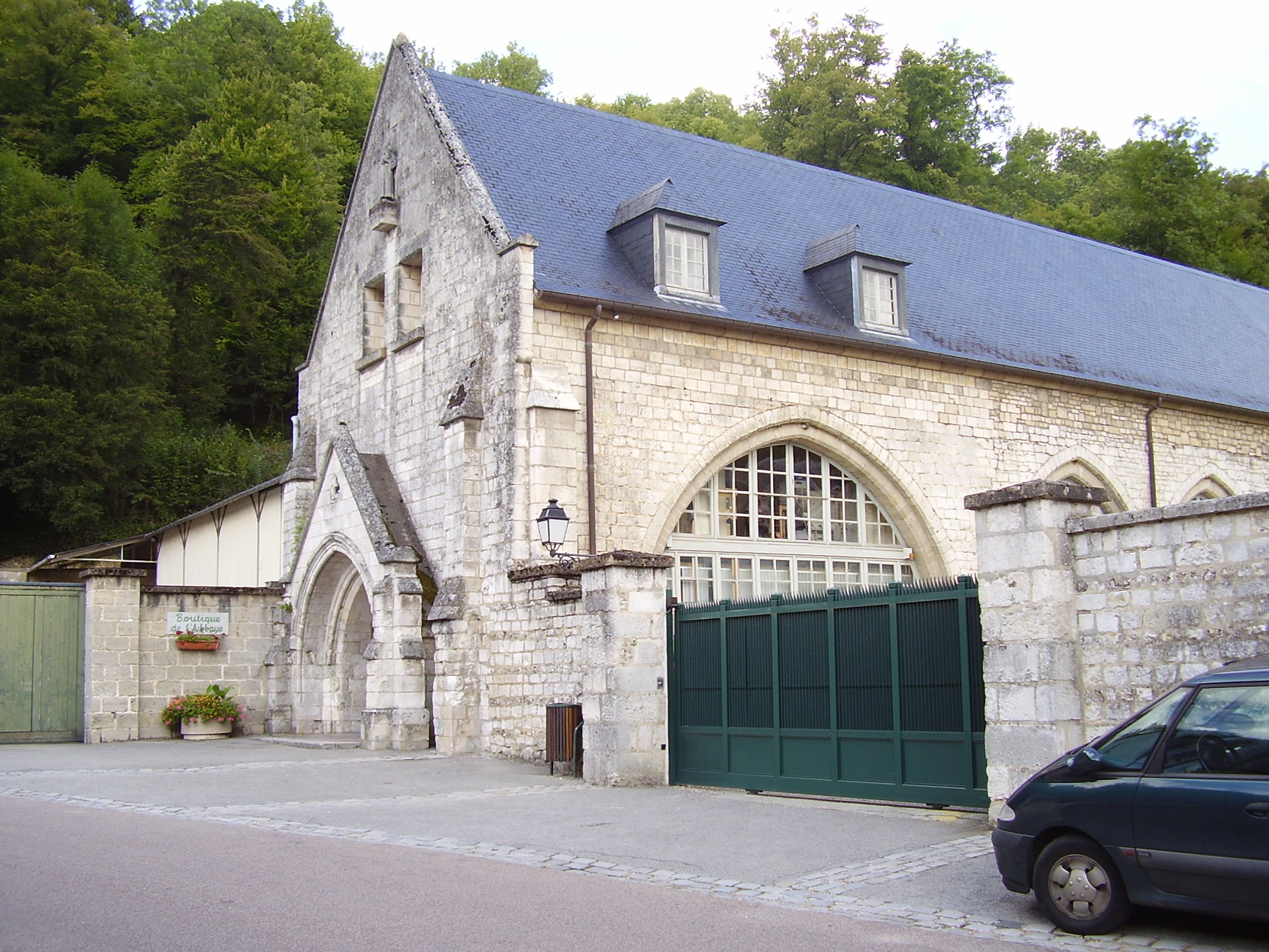 Abbaye de Saint-Wandrille de Fontenelle, France